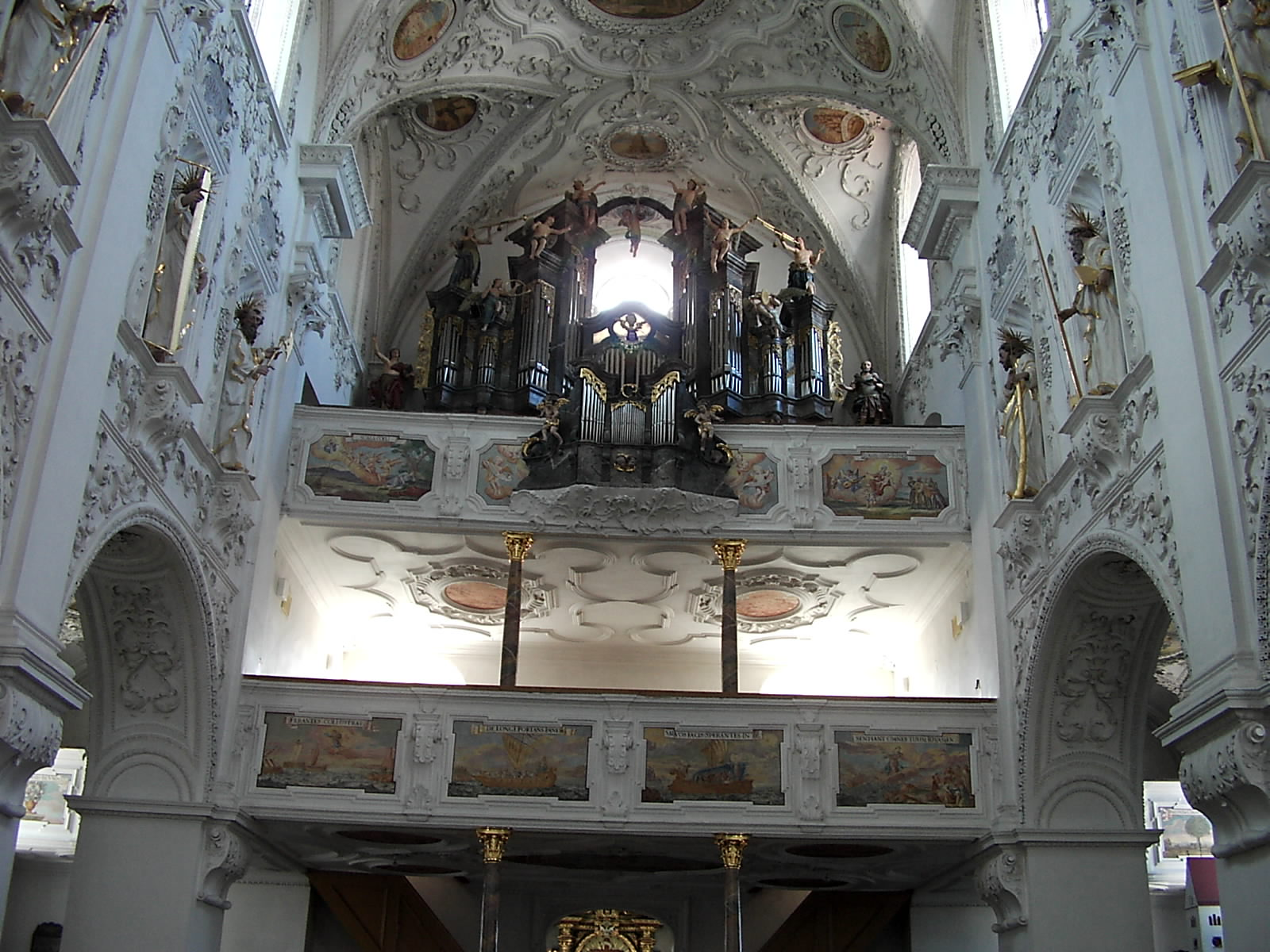 Wallfahrtskirche Kirchhaslach innen Blick nach Westen